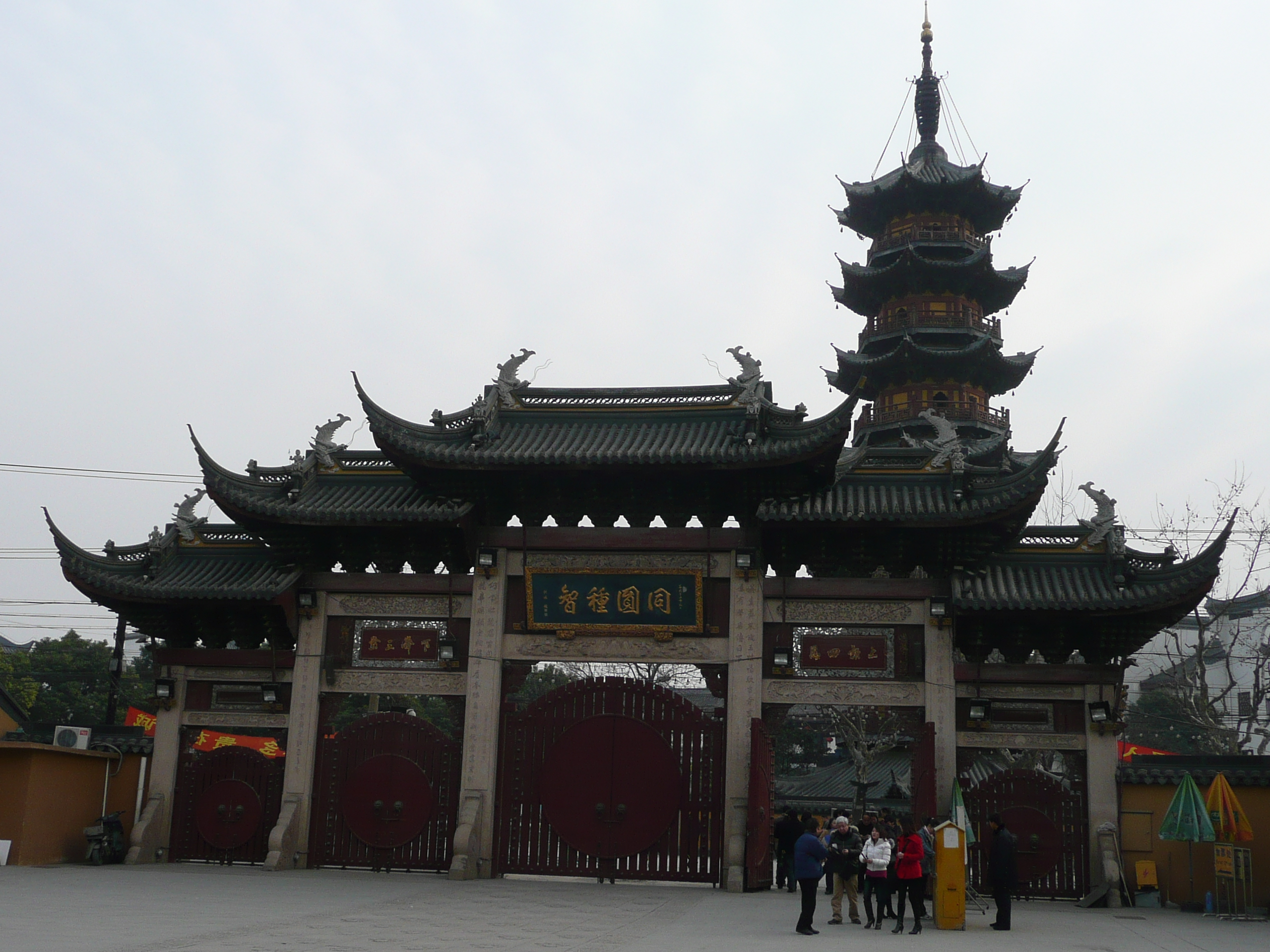 Templo de Longhua, Shngai, China.